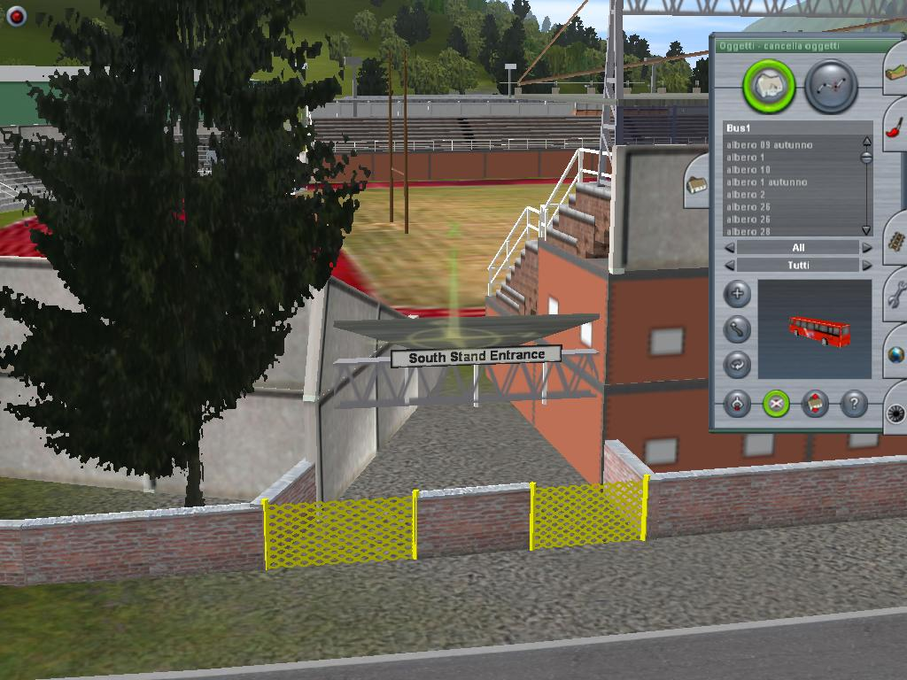 Visualizzazione della modalità "Ingegnere Ferroviario" a Trainz Railroad Simulator 2006